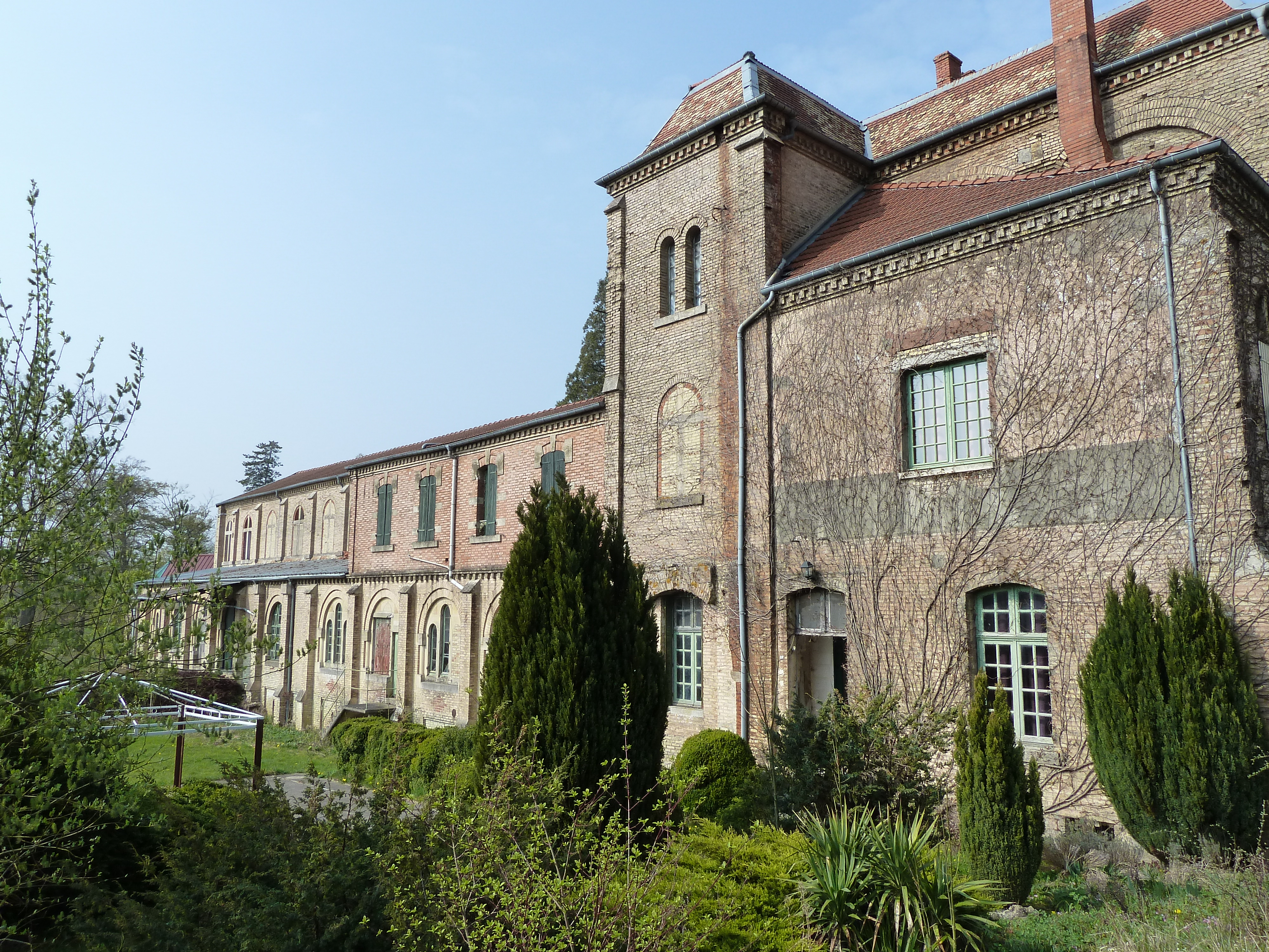 Noyers-Auzécourt 55 la Maison du Val monastère des trappistes